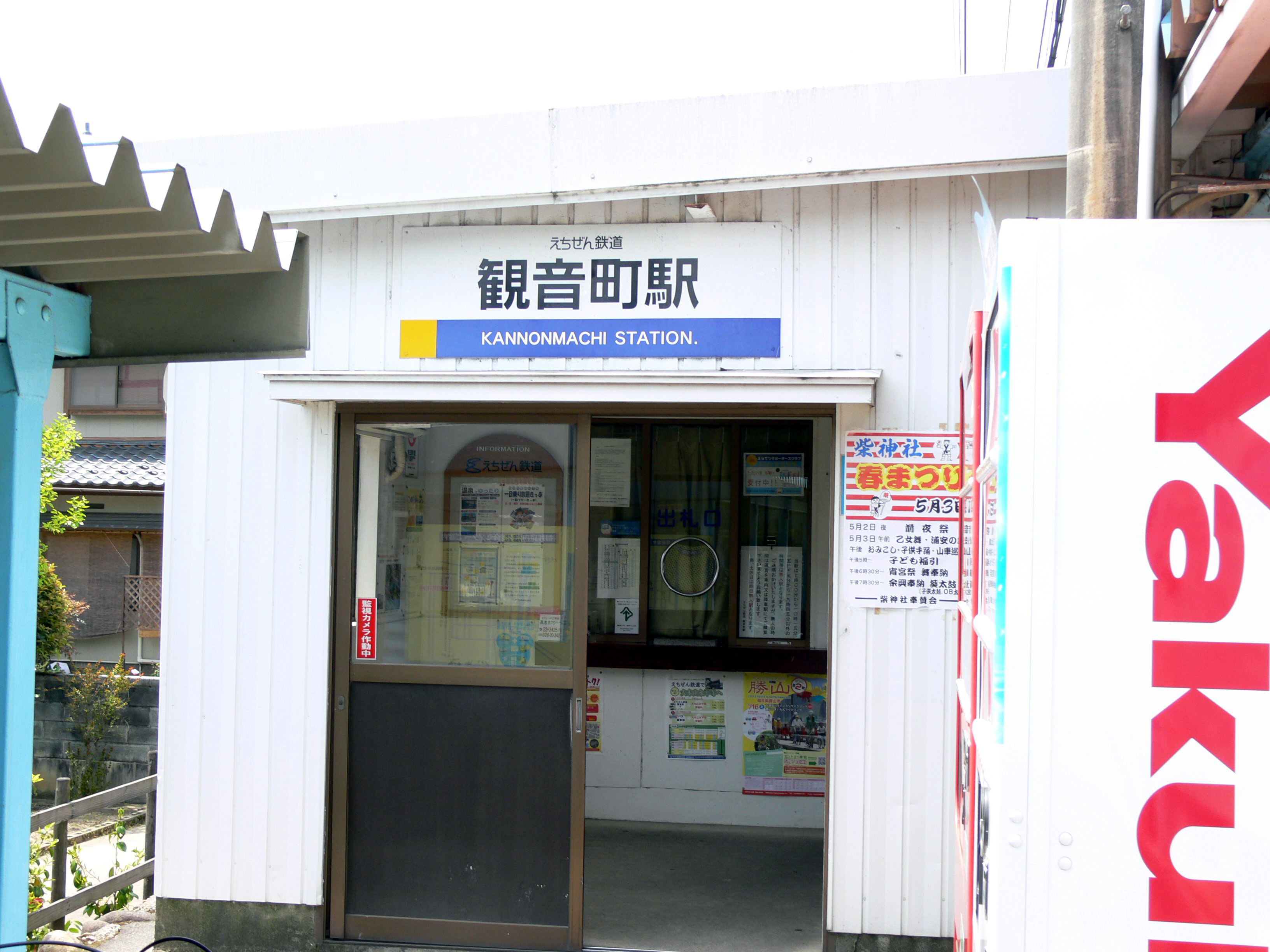 Kannonmachi Station